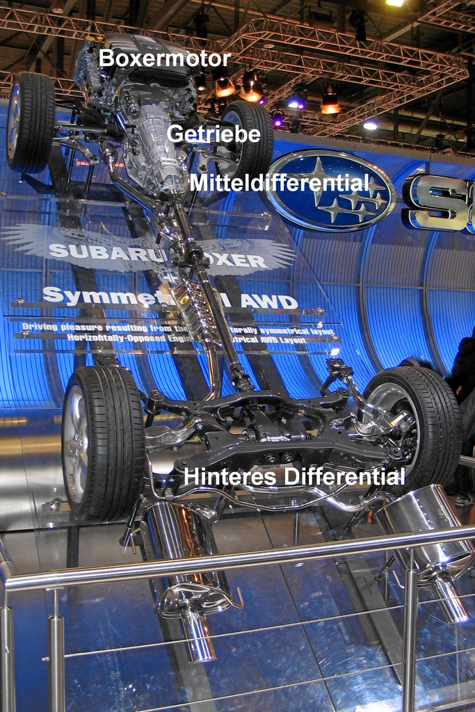 Symmetrical AWD